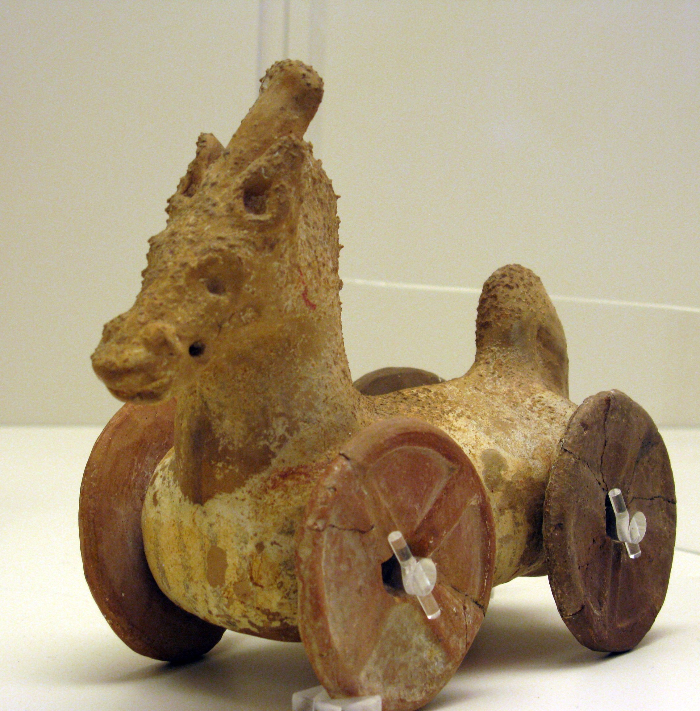 Αλογάκι-παιχνίδι. Από την Αθήνα. 4ος αι. μ.Χ. (4459)